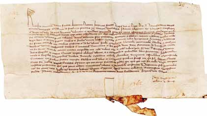 Privilegium vydané Karlem IV. pro Moravskou Ostravu, kterým přiznal městu právo na konání výročního trhu.